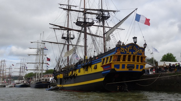 l'Etoile du ROY pendant l'Armada de ROUEN en juin 2013